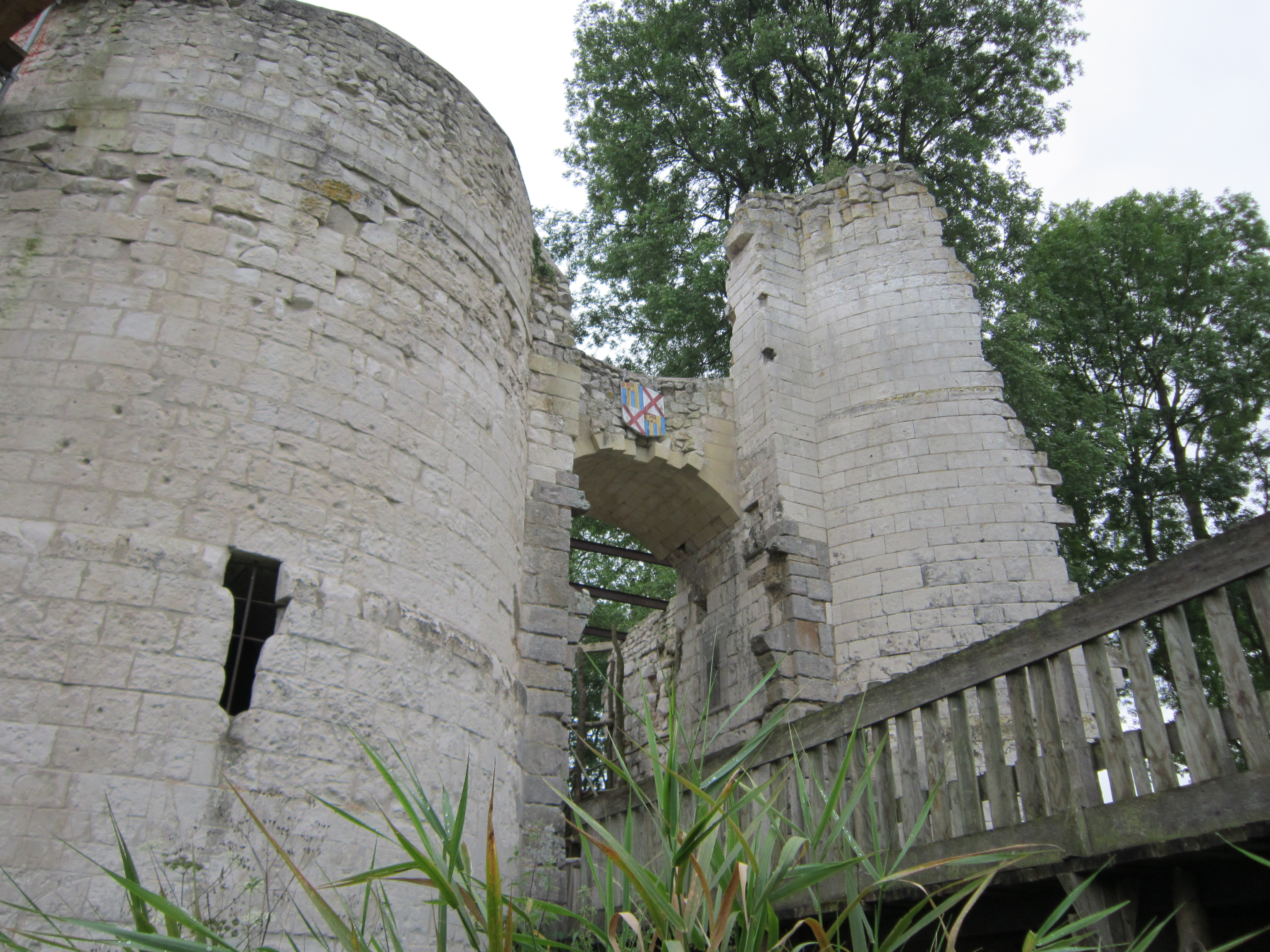 Le château d'Eaucourt sur Somme en Picardie, vestiges de la fin du XIV° et du début XV°, l'ancien pont-levis